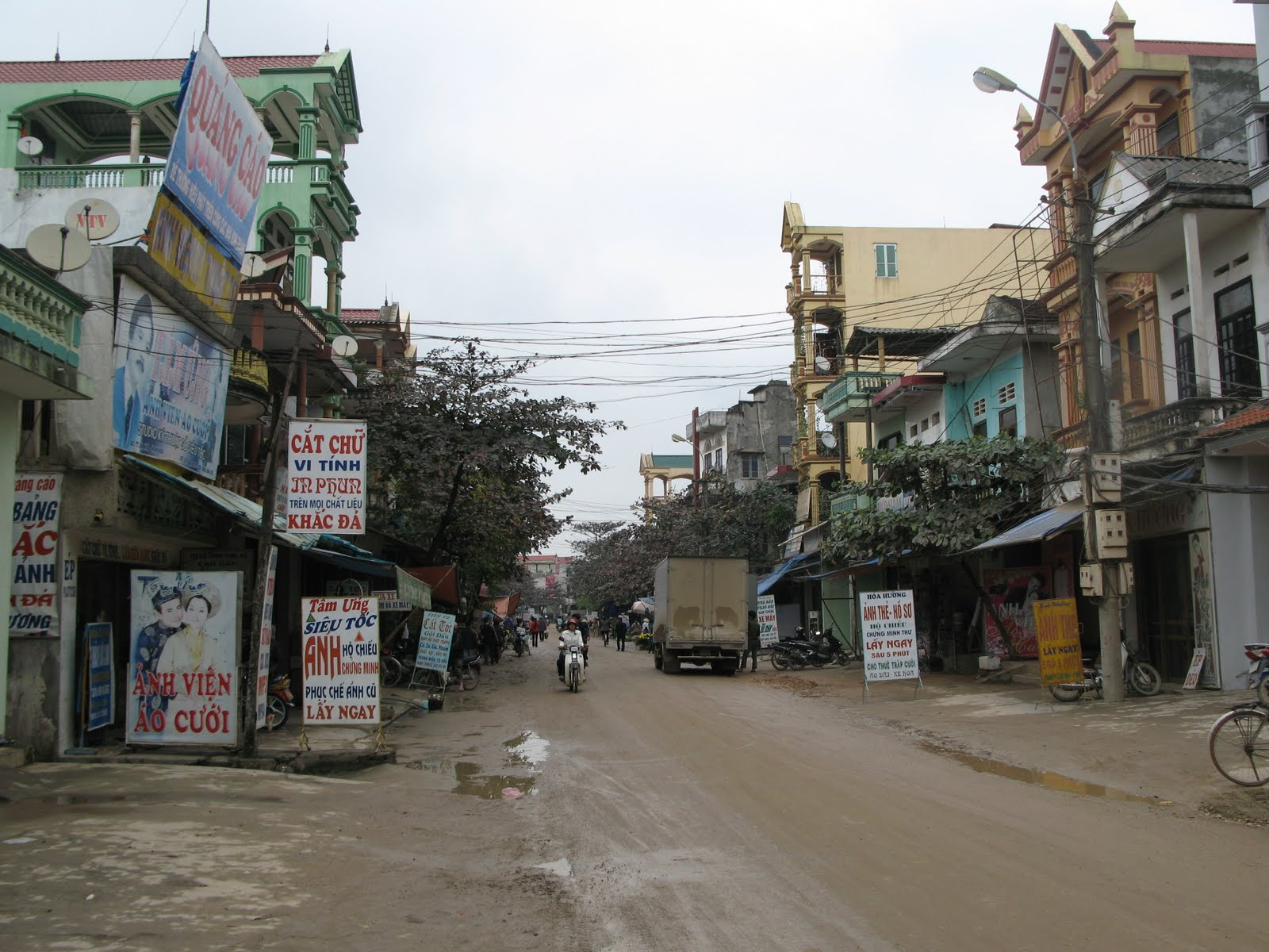 Thị trấn Hạ Hòa, huyện Hạ Hòa, Phú Thọ, Việt Nam